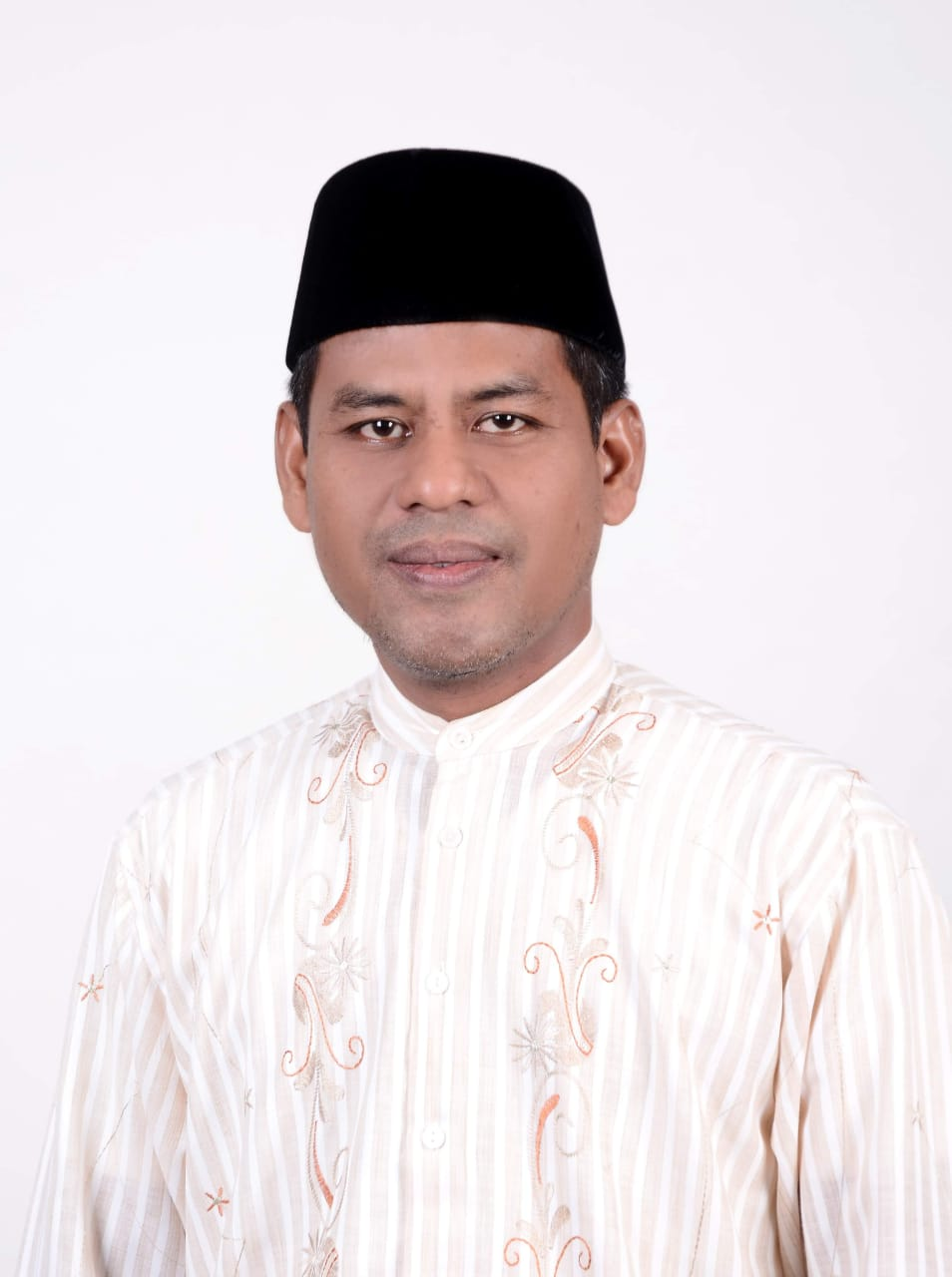 DR. Arwani Syaerozi